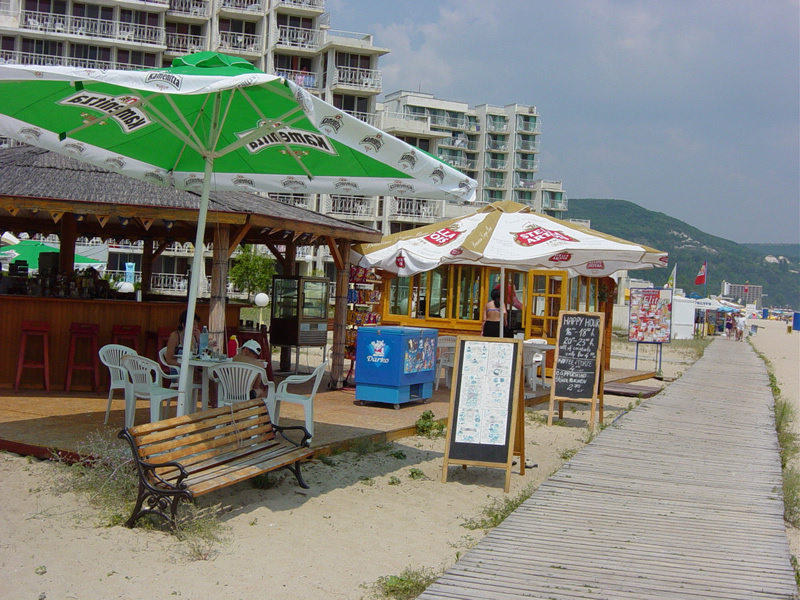 Albena Shore